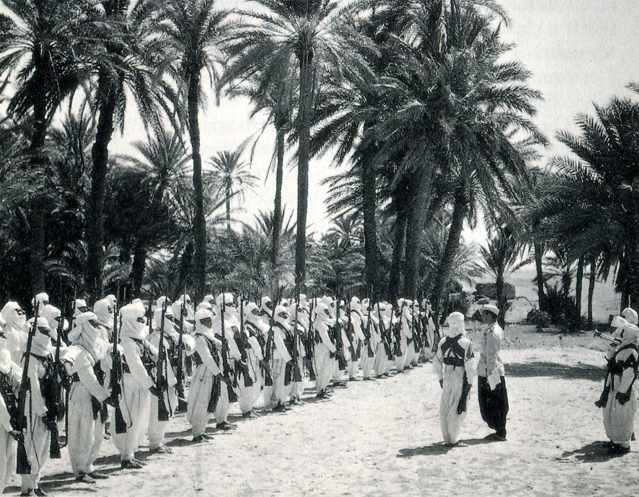 L'adunata nell'oasi in "Squadrone bianco" (Genina, 1936)